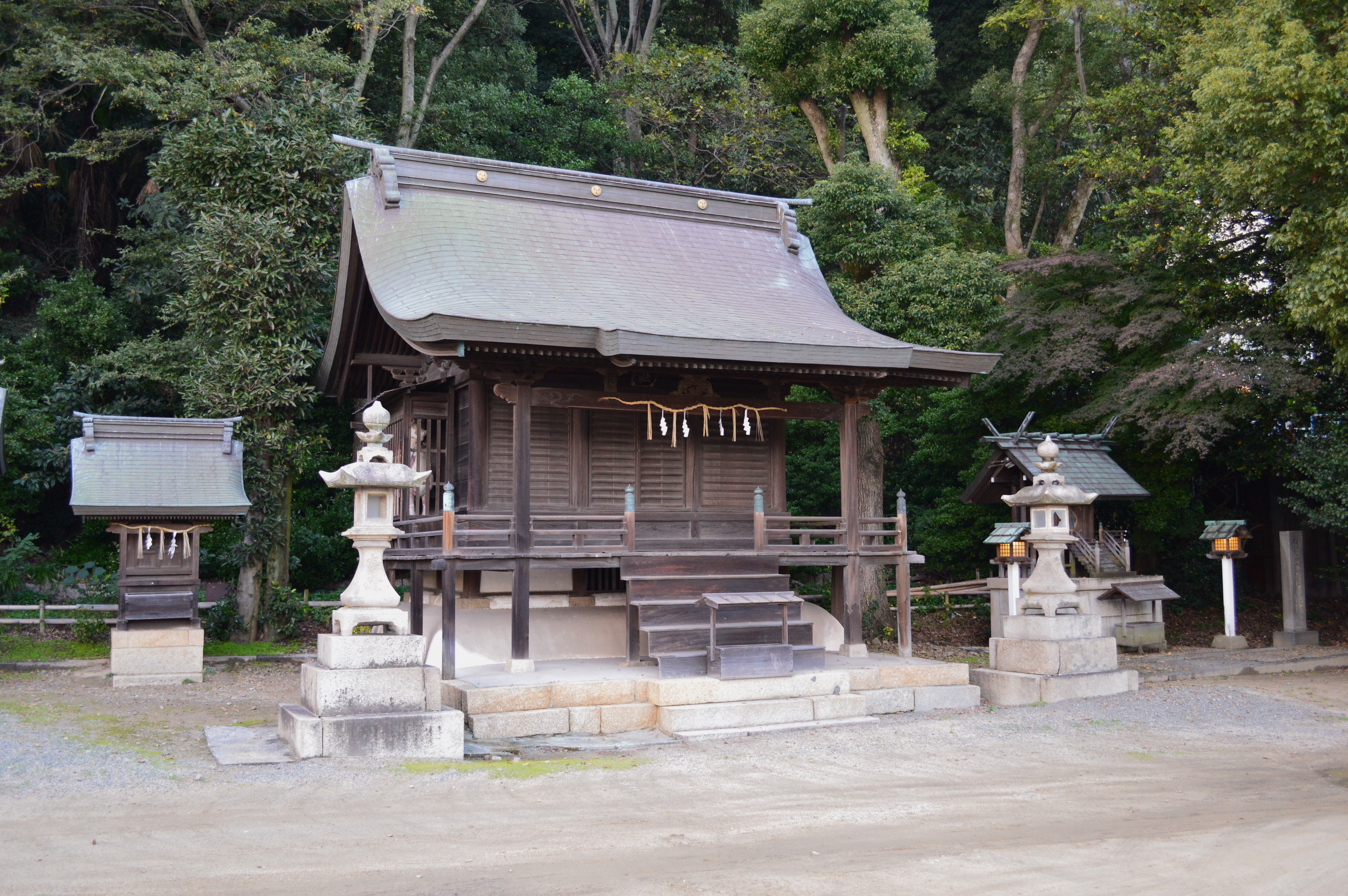 沼名前神社 境内渡守社